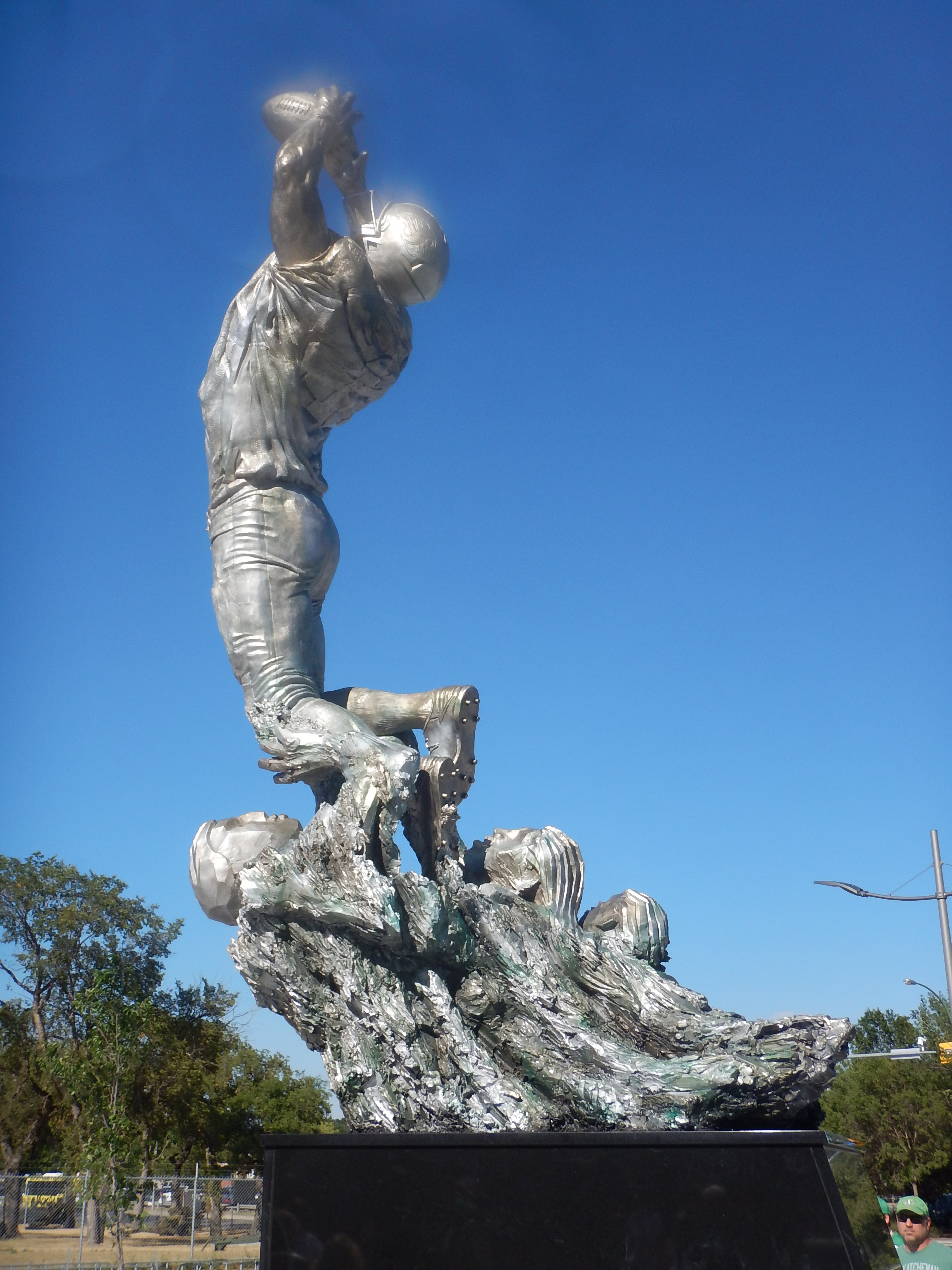 2017 08 12a Rider BC Game 11